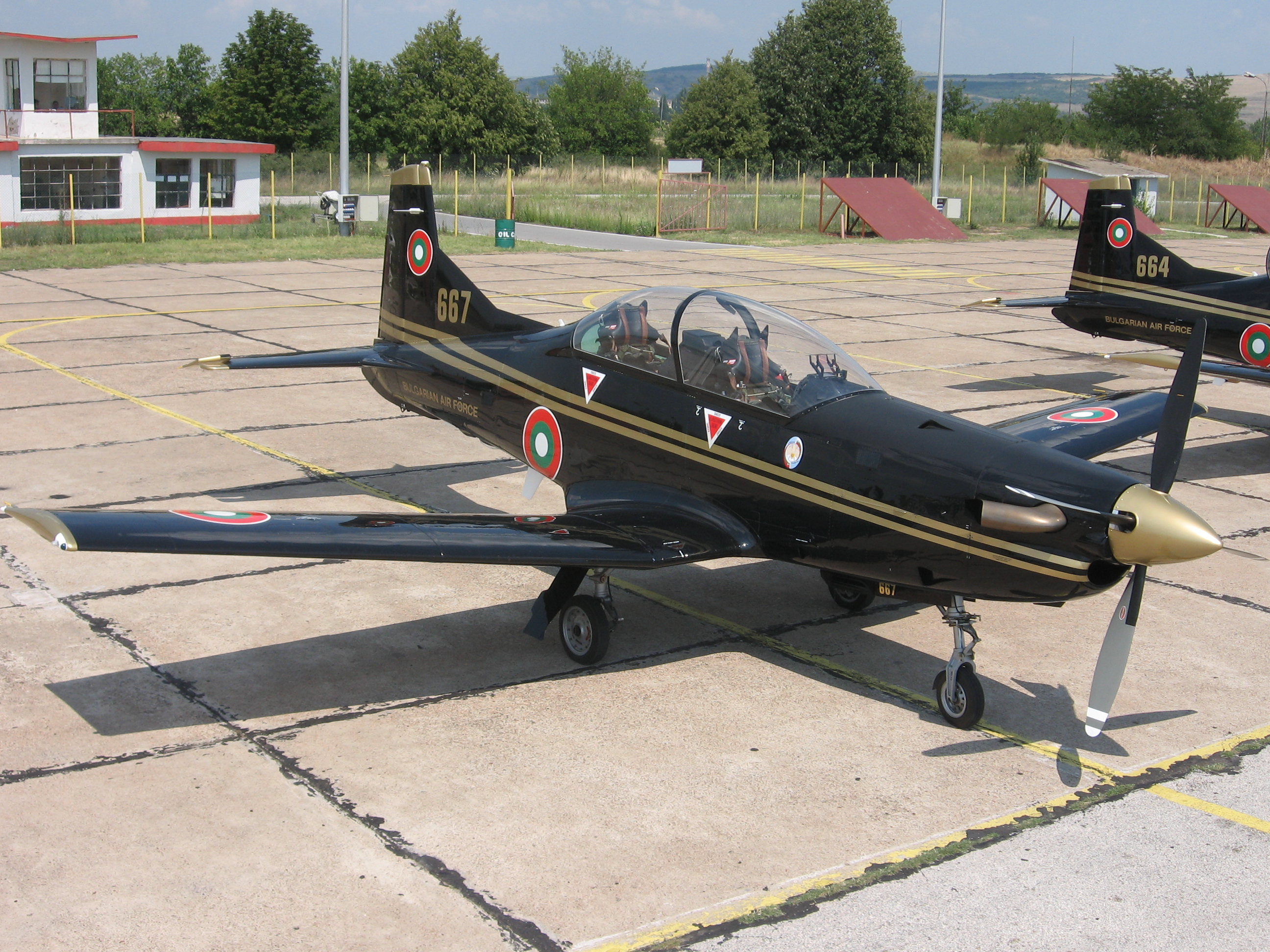 Витлов учебнотренировъчен самолети Pilatus PC-9M